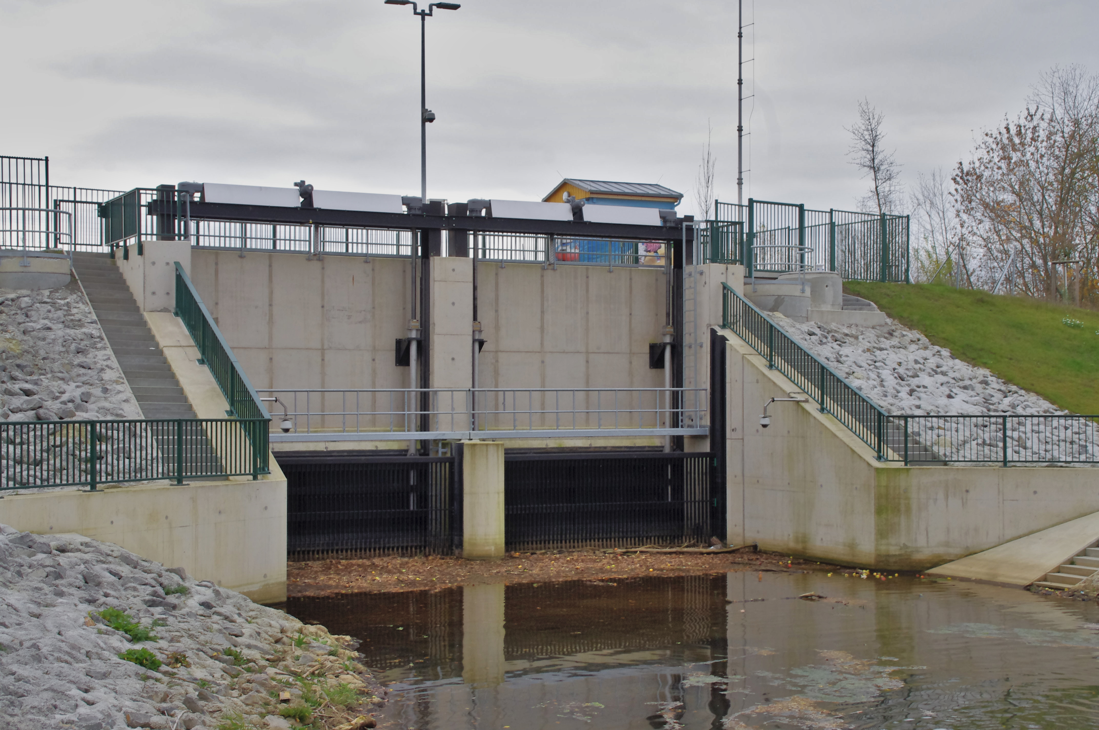 Wehr bei Zwenkau